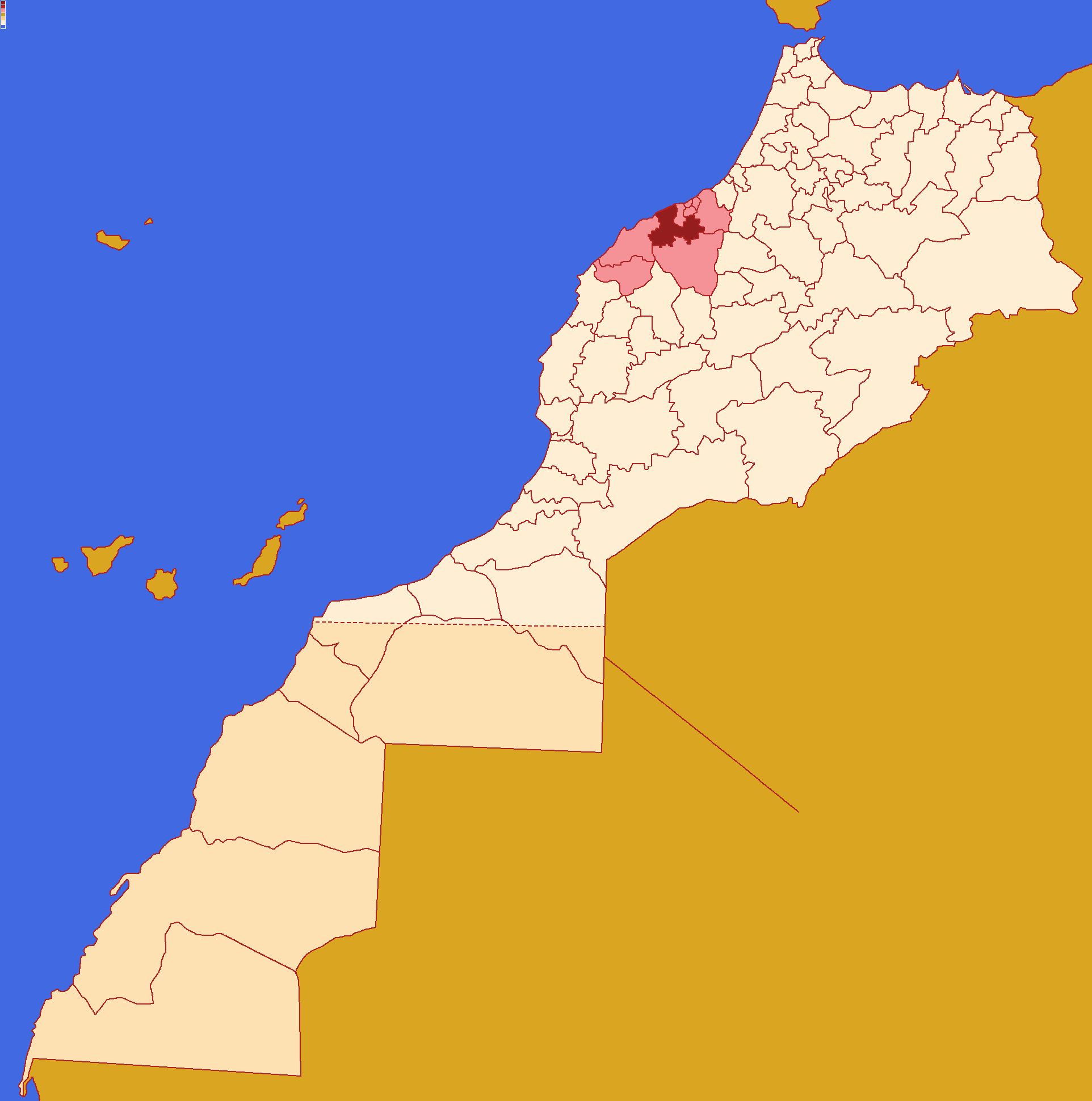 Localização da província de Berrechid , dentro da região de Casablanca-Settat e dentro de Marrocos. Conforme a reforma administrativa de 2015.